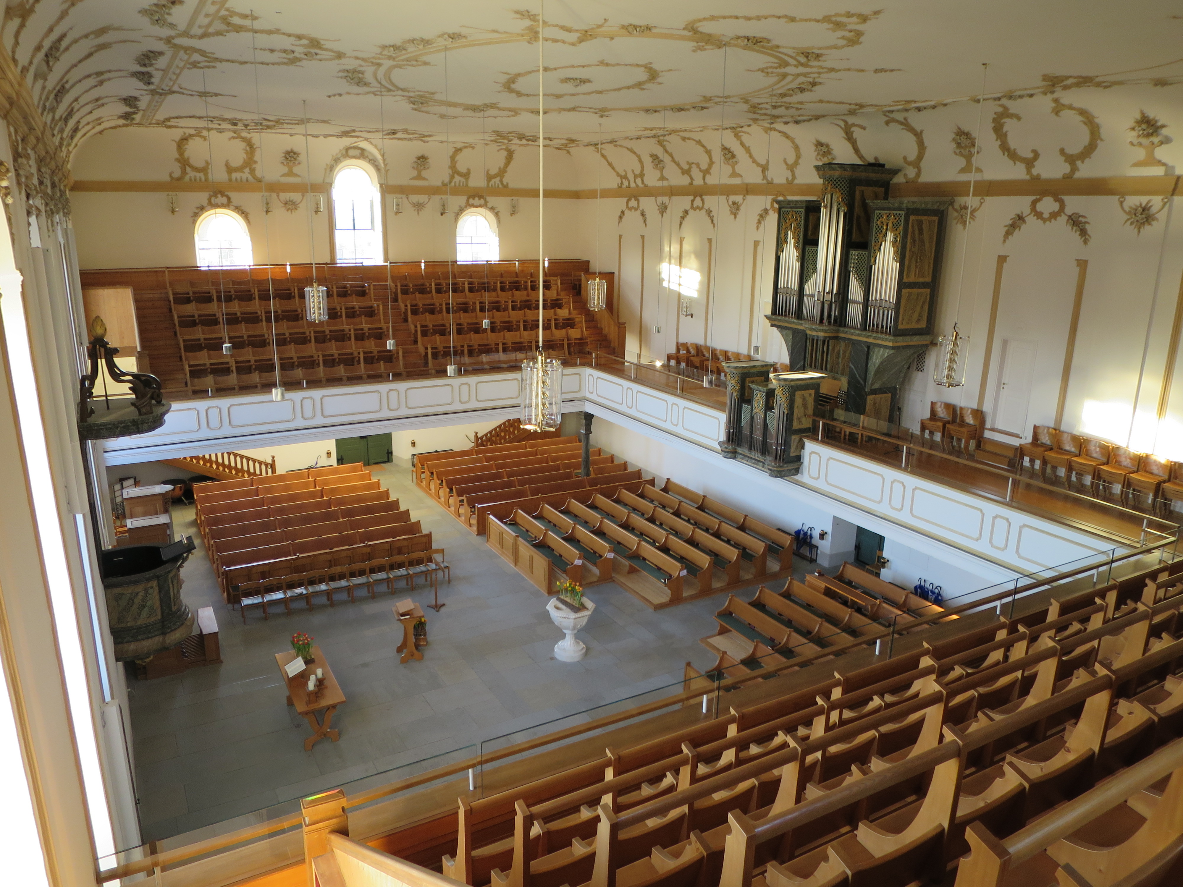 Ref. Kirche Hinwil, Schweiz, Innen